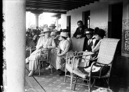 Inauguración del Hipódromo de Aranjuez; [la Reina Victoria Eugenia junto a Varios Espectadores Sentados en Uno de los Palcos del Hipódromo de Aranjuez en Madrid]